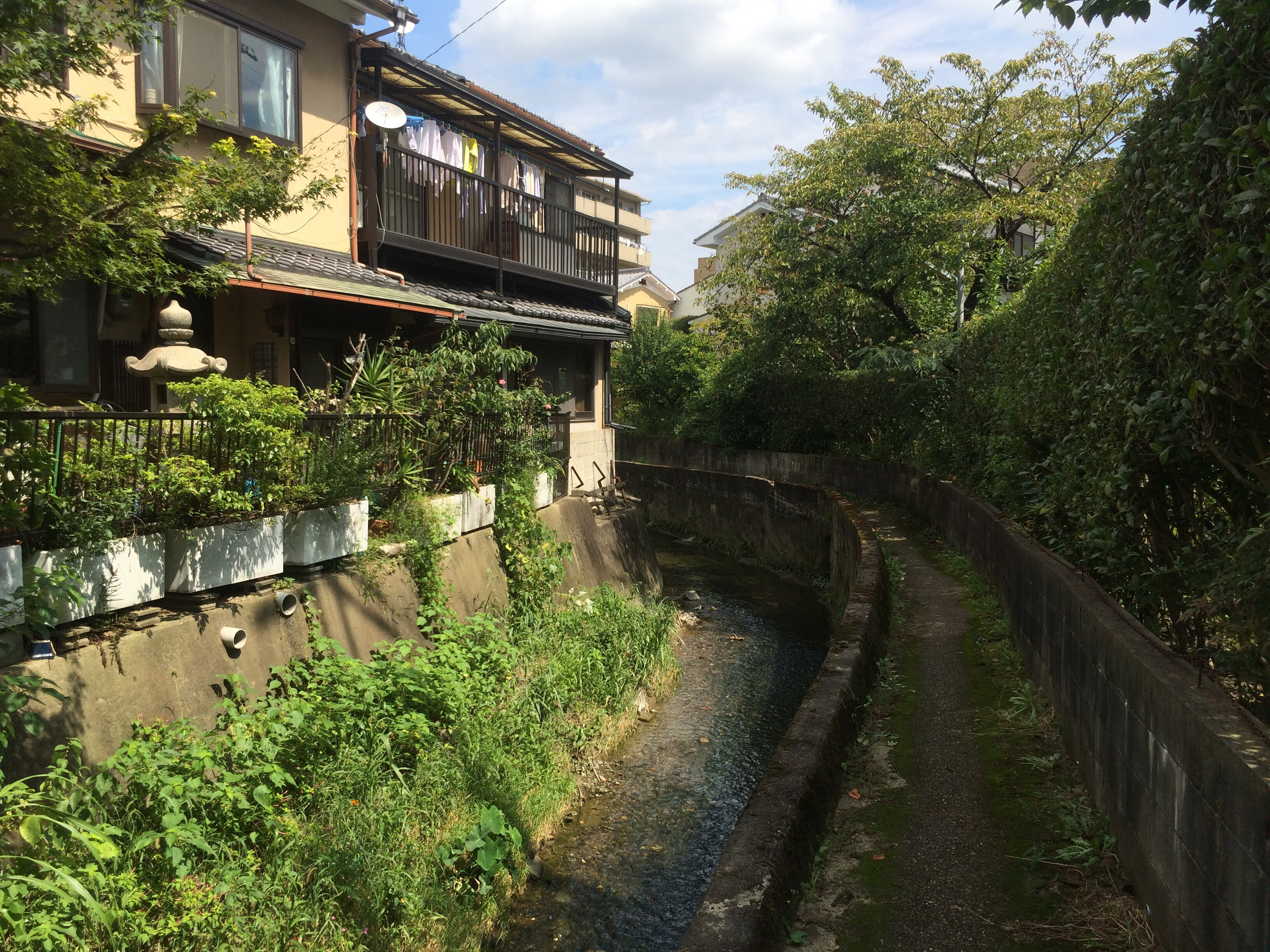 直違橋付近から上流を見た七瀬川、京都